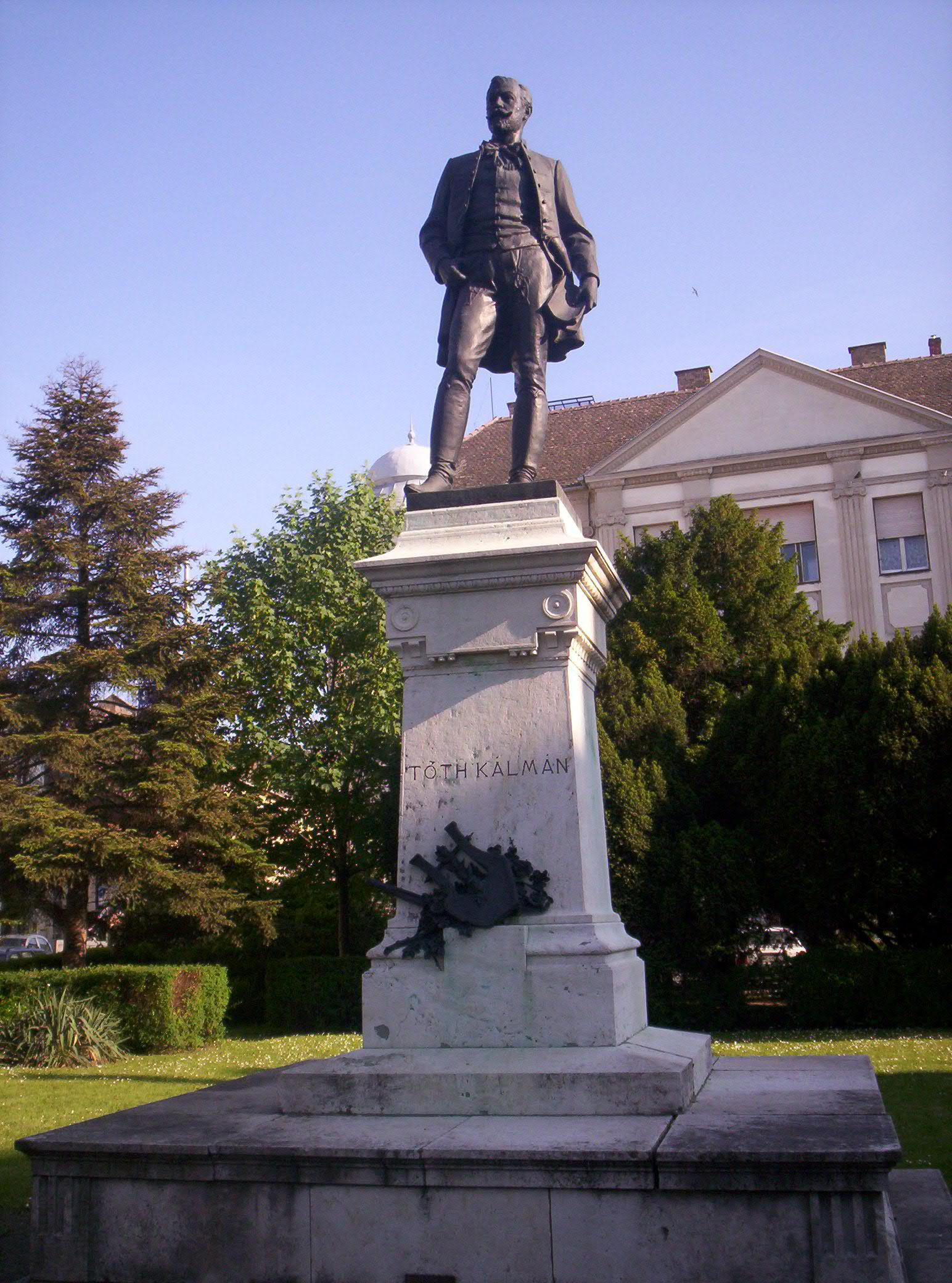 Tóth Kálmán szobra Baján. Bezerédi Gyula (1894) alkotása.